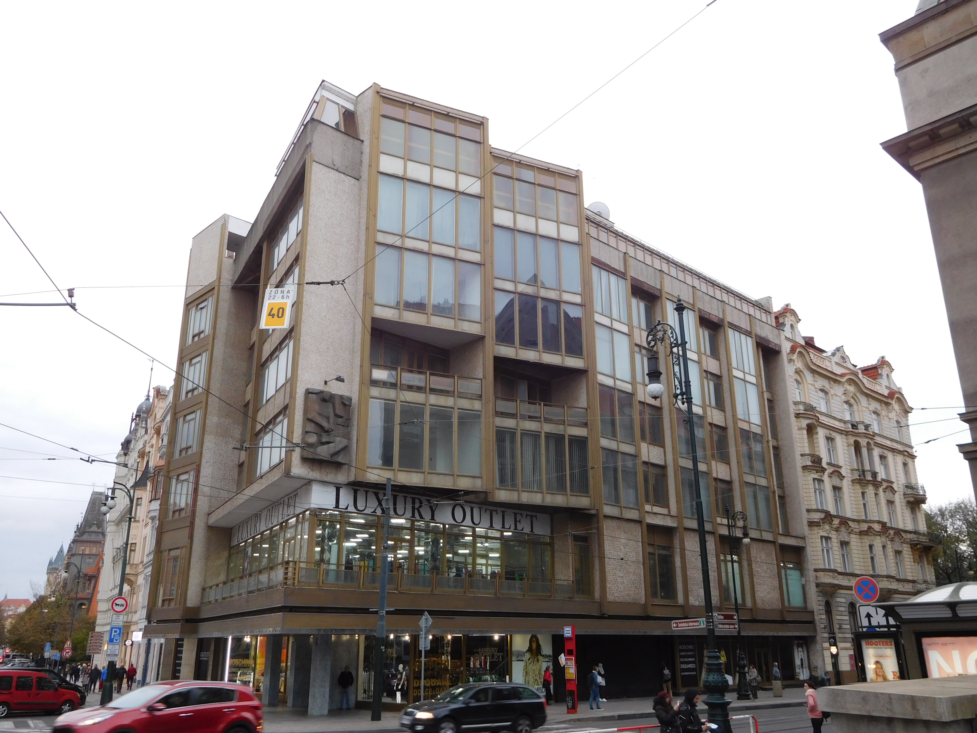 Praha - Josefov, Pařížská 25